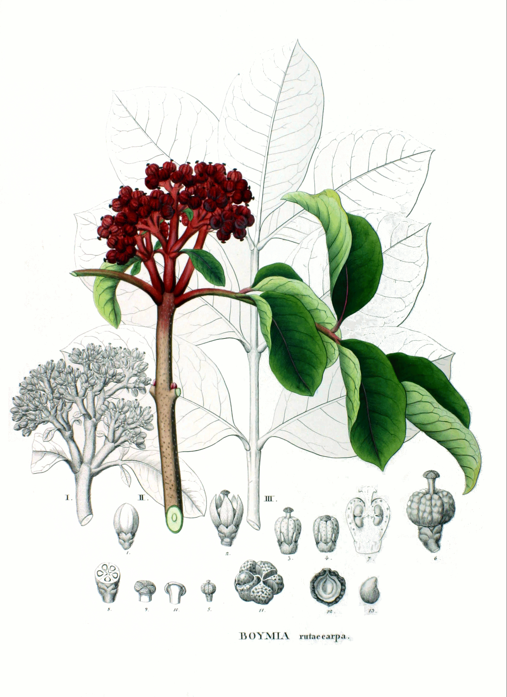 Tetradium ruticarpum (syn. Evodia rutaecarpa per USDA ARS/GRIN) Plate from book